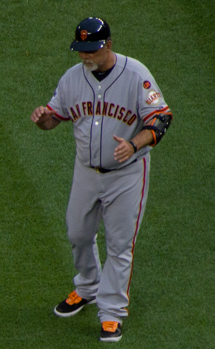 Bill Hayes